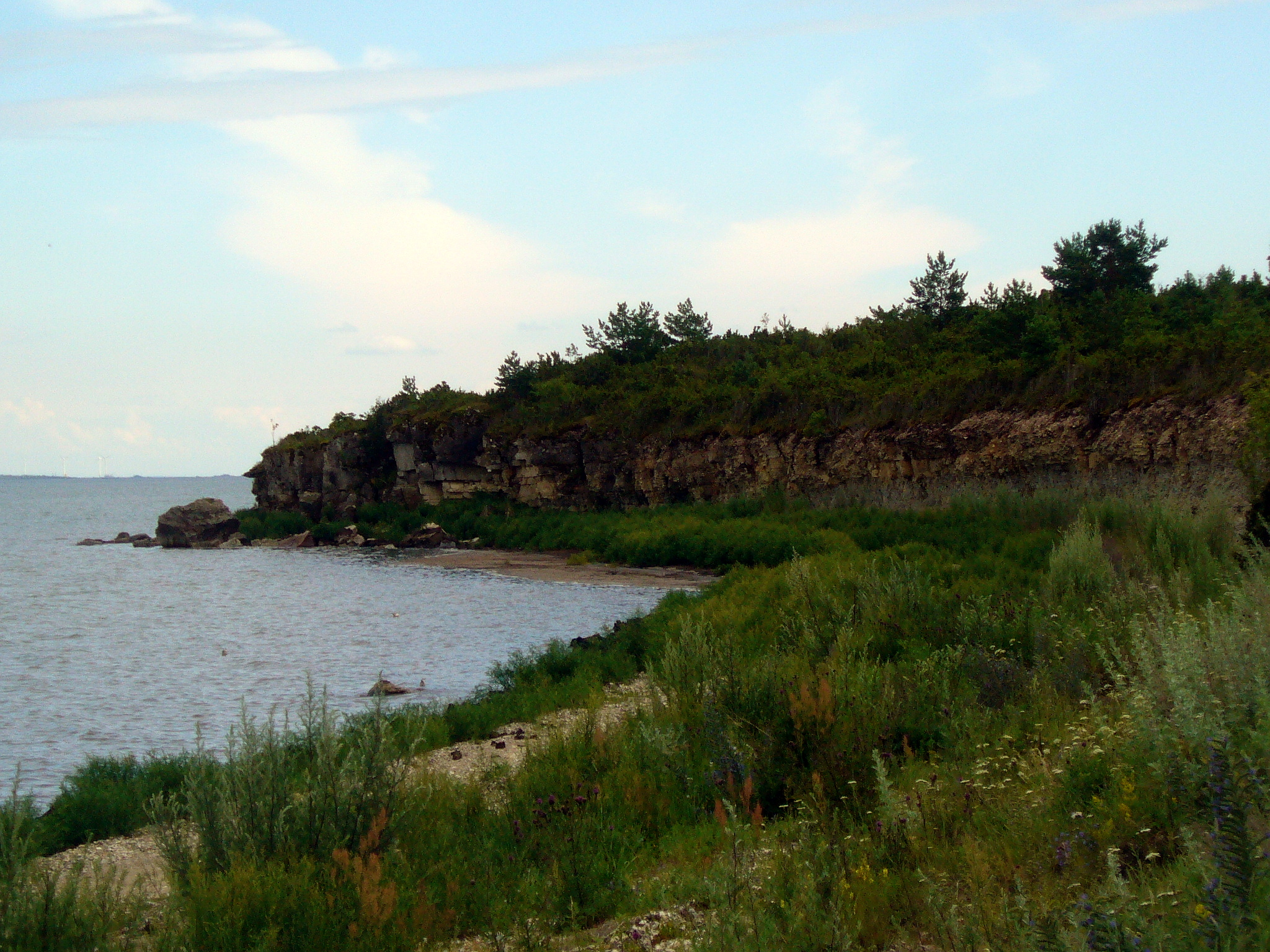 Püssina pank põhja poolt. Taamal vaevu märgatav Virtsu tuulepark.